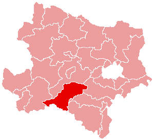 Karte: politischer Bezirk Gänserndorf Lizenz: GNU FDL Quelle: Zeichnung plp Datum: de:2004 Ort: Wien